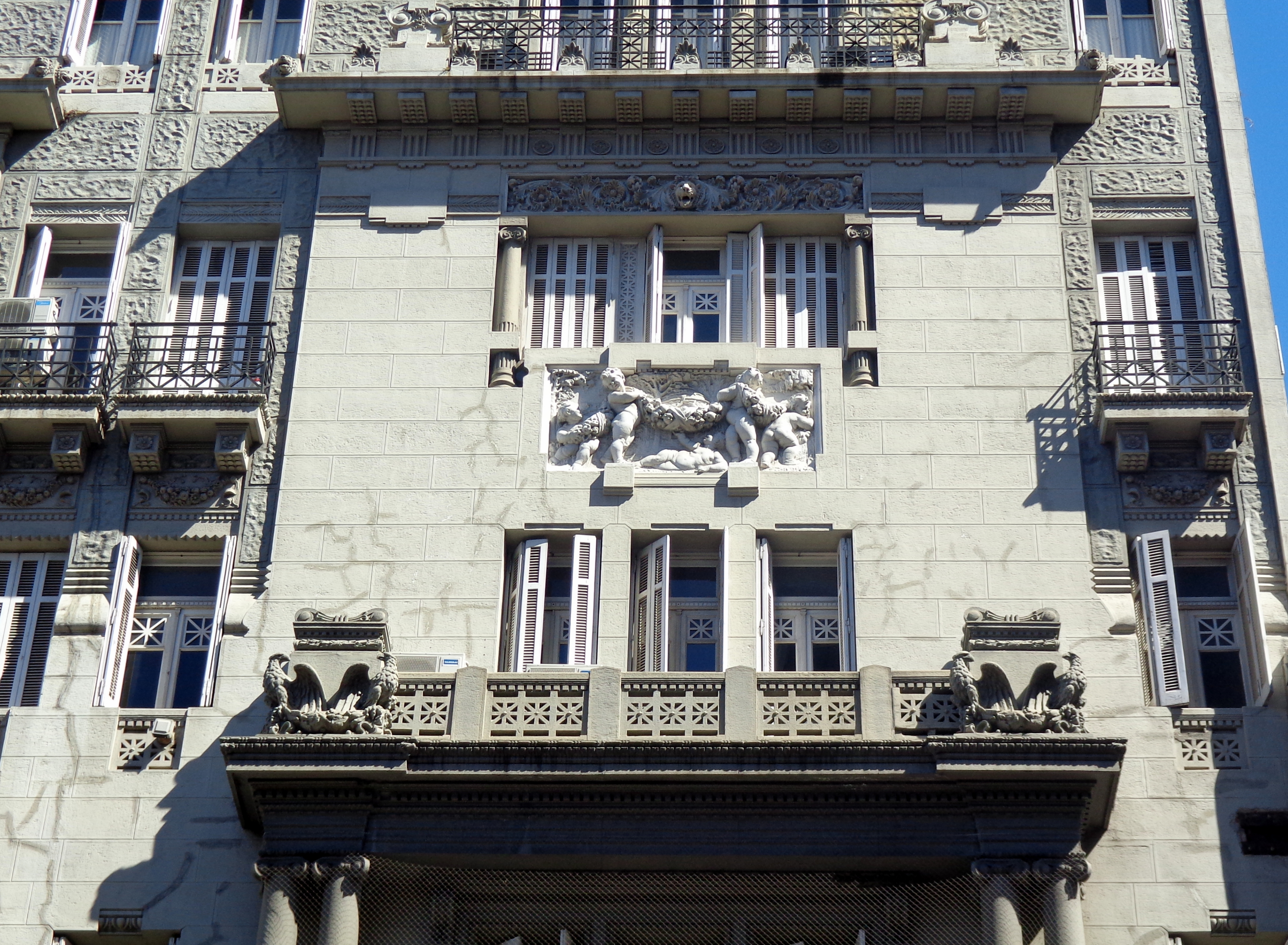 Casa Grimildi, Avenida Corrientes 2548, 2554 y 2560. Bajorrelieve con querubines. Buenos Aires, Argentina